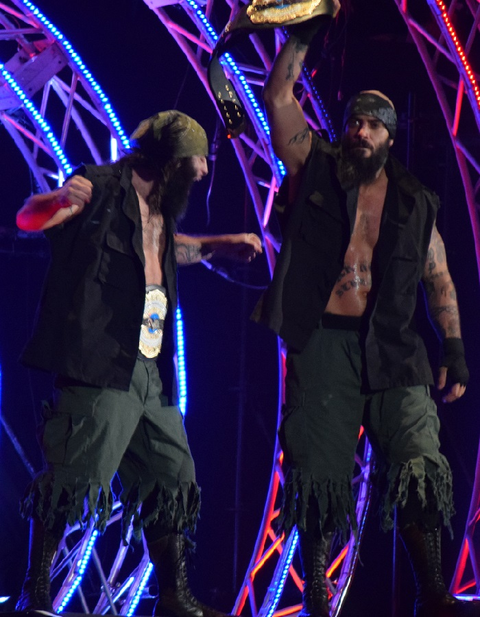 2016年2月11日 大阪府立体育会館 「THE NEW BEGINNING in OSAKA」 マーク・ブリスコ（左）とジェイ・ブリスコ（右）